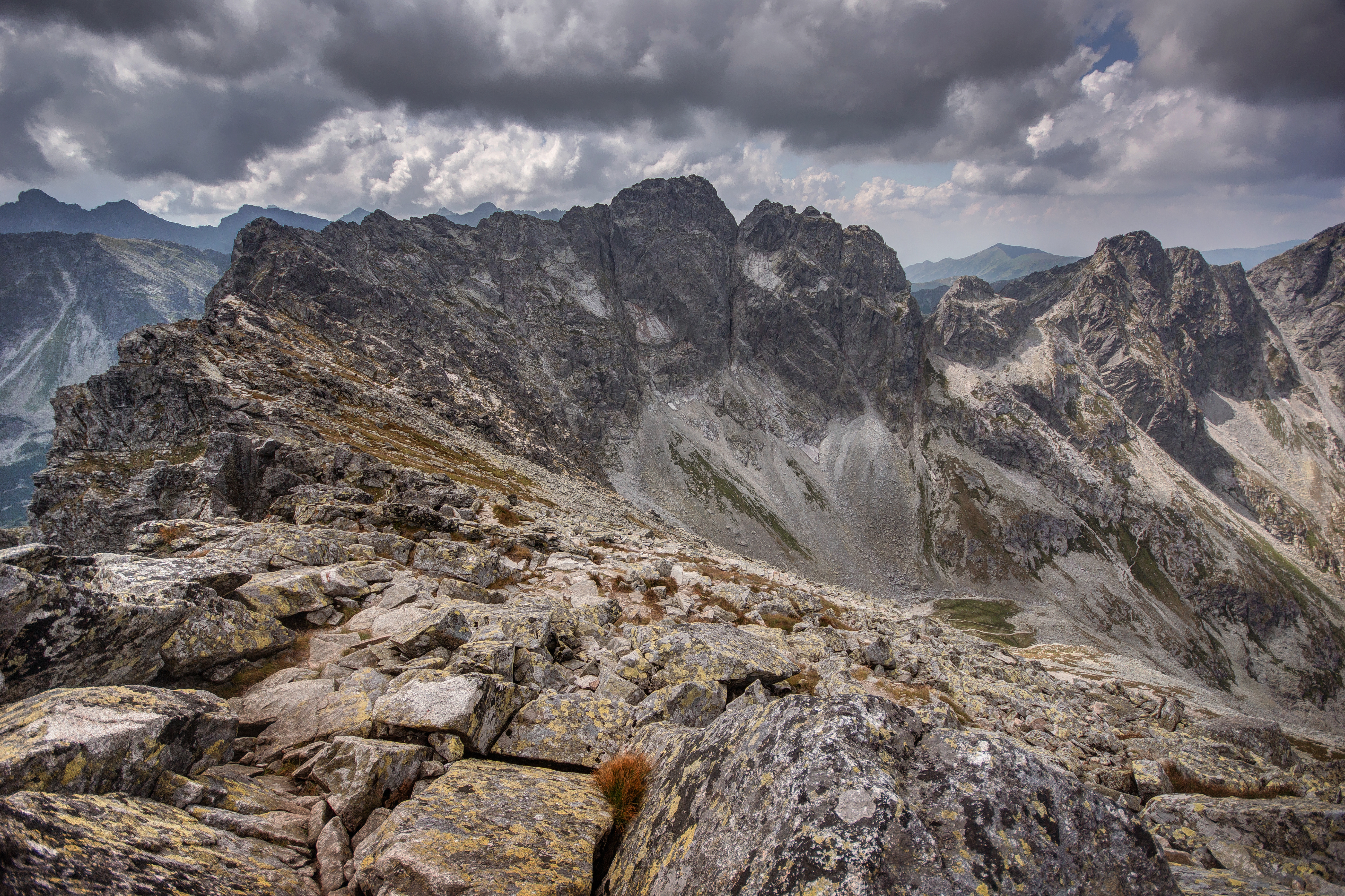 Specjalny obszar ochrony siedlisk: Tatry Orla Perć - widok z Zadniego Granatu This is a photography of protected area with CRFOP ID PL.ZIPOP.1393.N2K.PLC120001.H